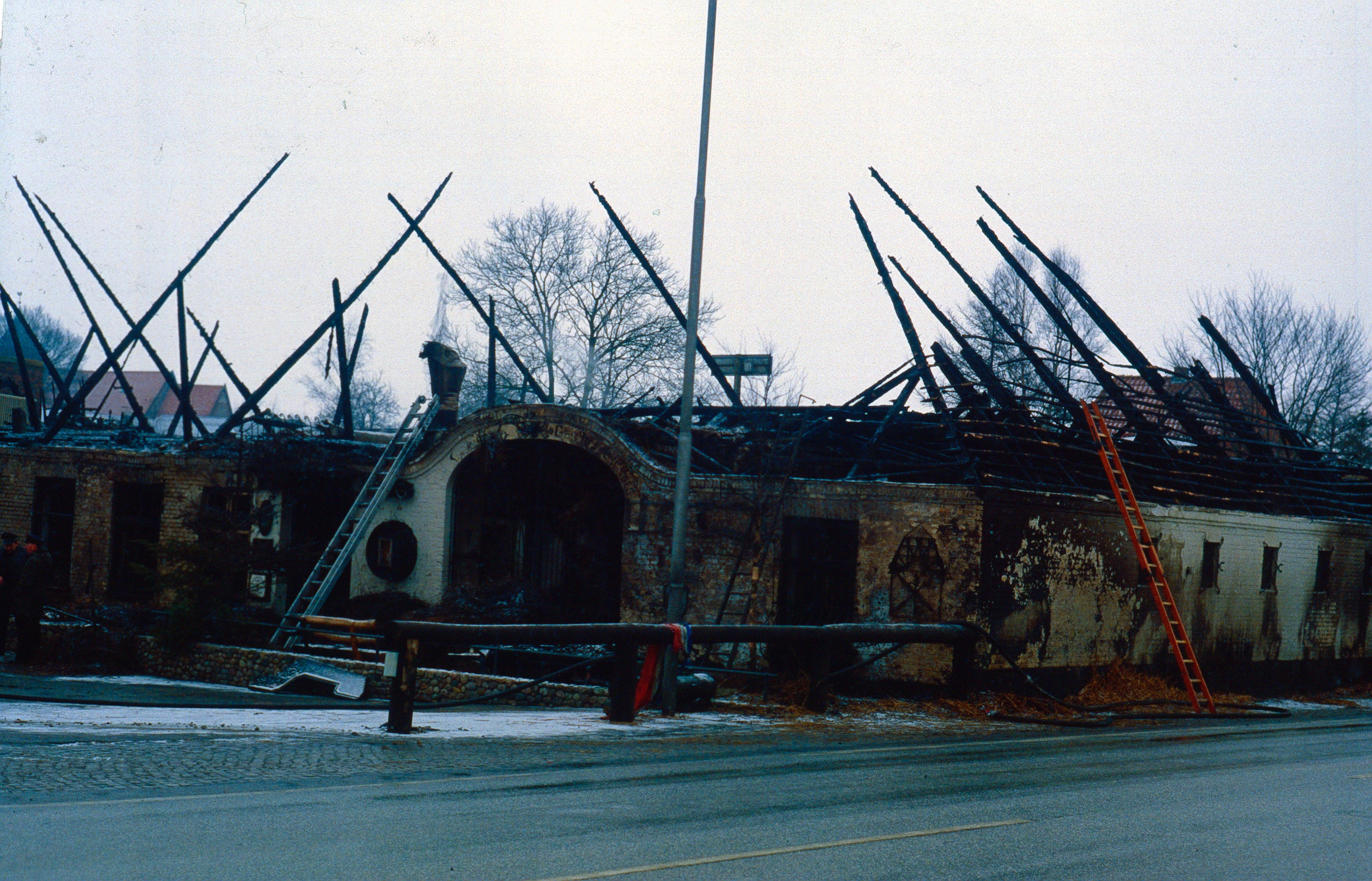 Der Historische Krug nach dem Feuer, das Bild wurde im Januar 1980 aufgenommen.